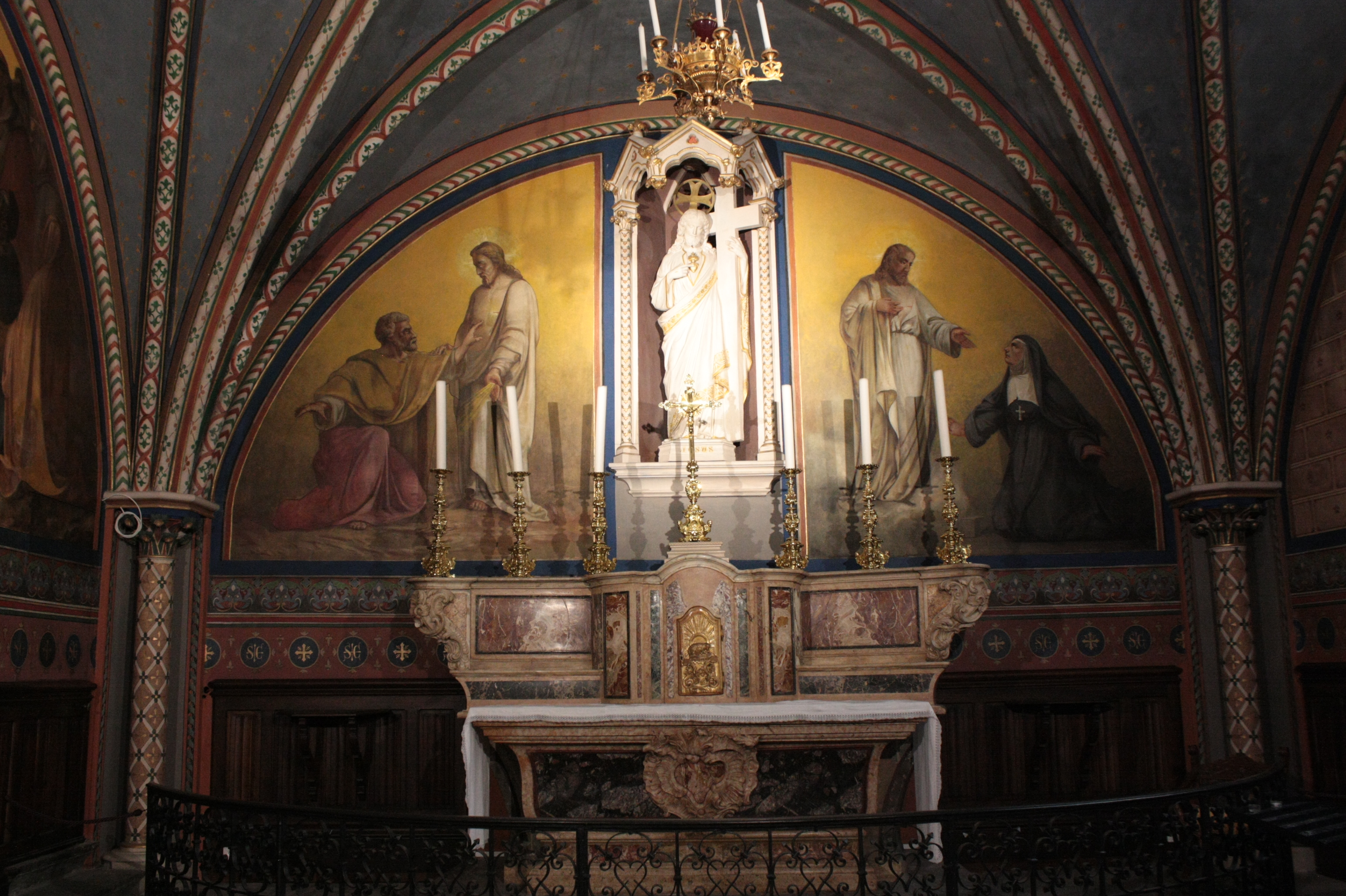 Chapelle du Sacré-Cœur : Autel et peintures de Laurent Guétal.